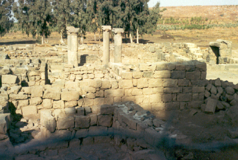 בית הכנסת העתיק בקצרין. צילמתי את זה אי שם בתחילת שנות השמונים.